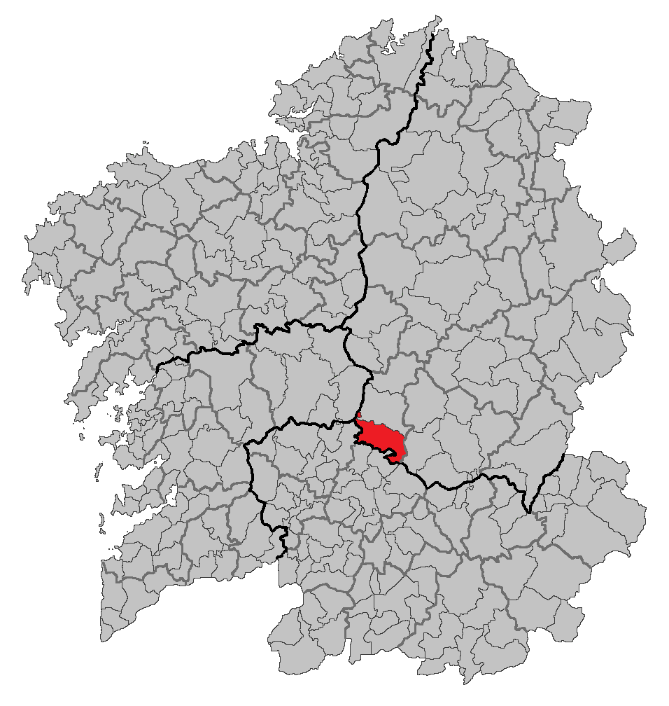 Mapa coa localización do concello de Carballedo.